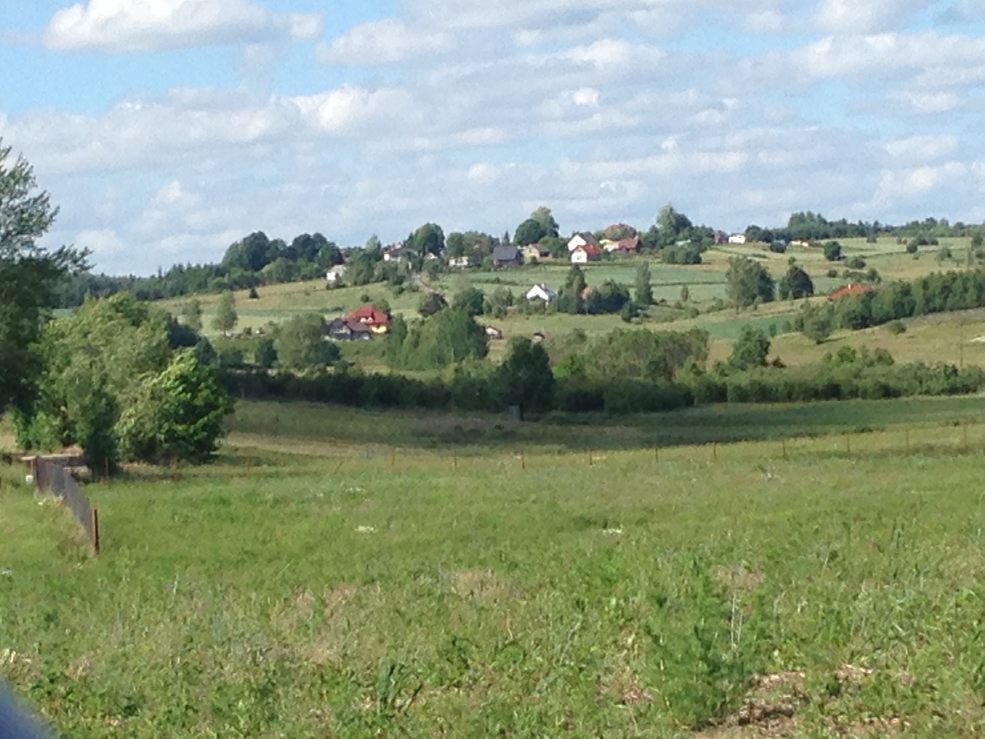 Błotnia, Polen